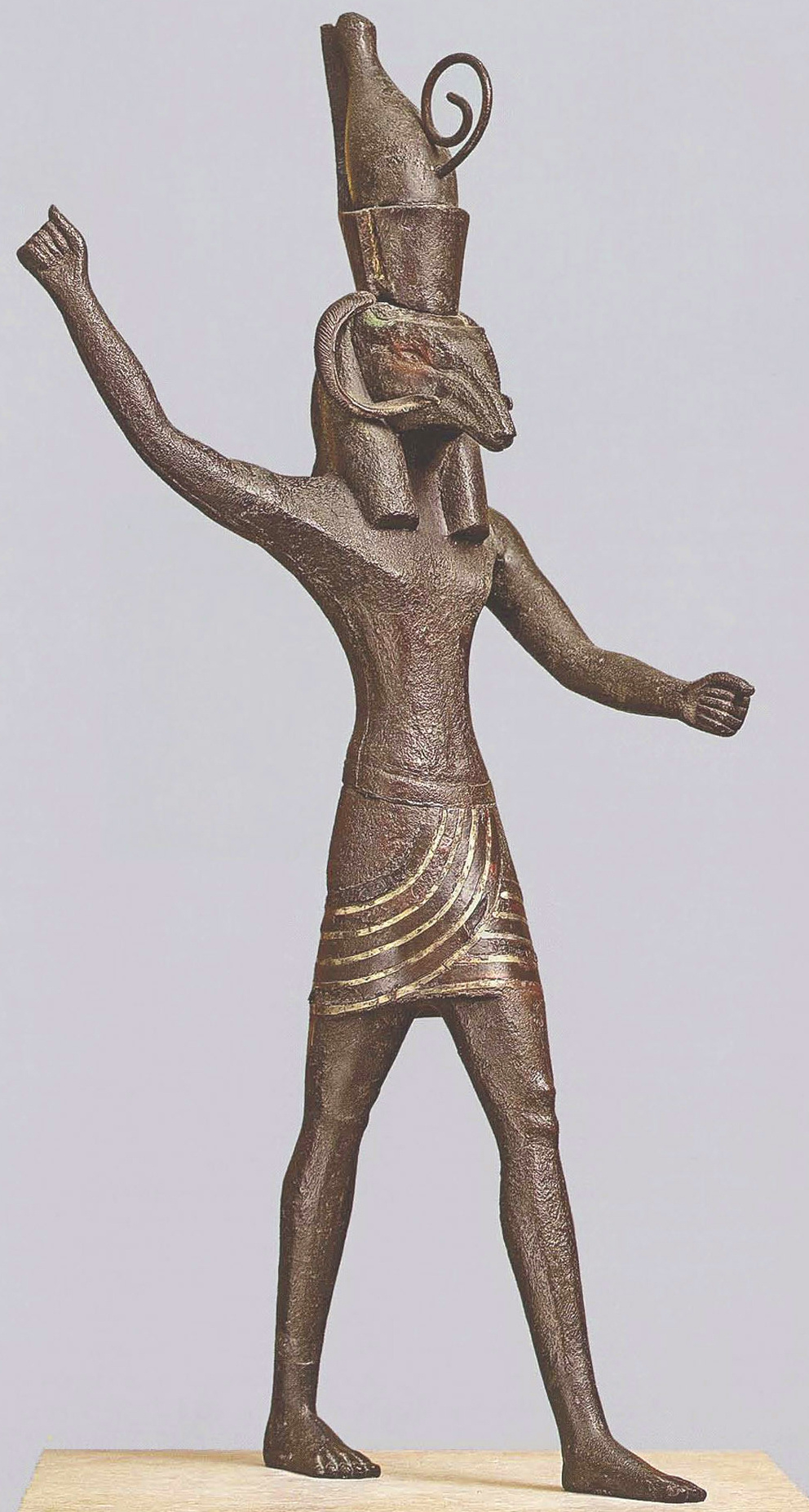 Statuette en bronze représentant Seth sous l'aspect du bélier d'Amon. Ny Carlsberg Glyptotek, Copenhague.